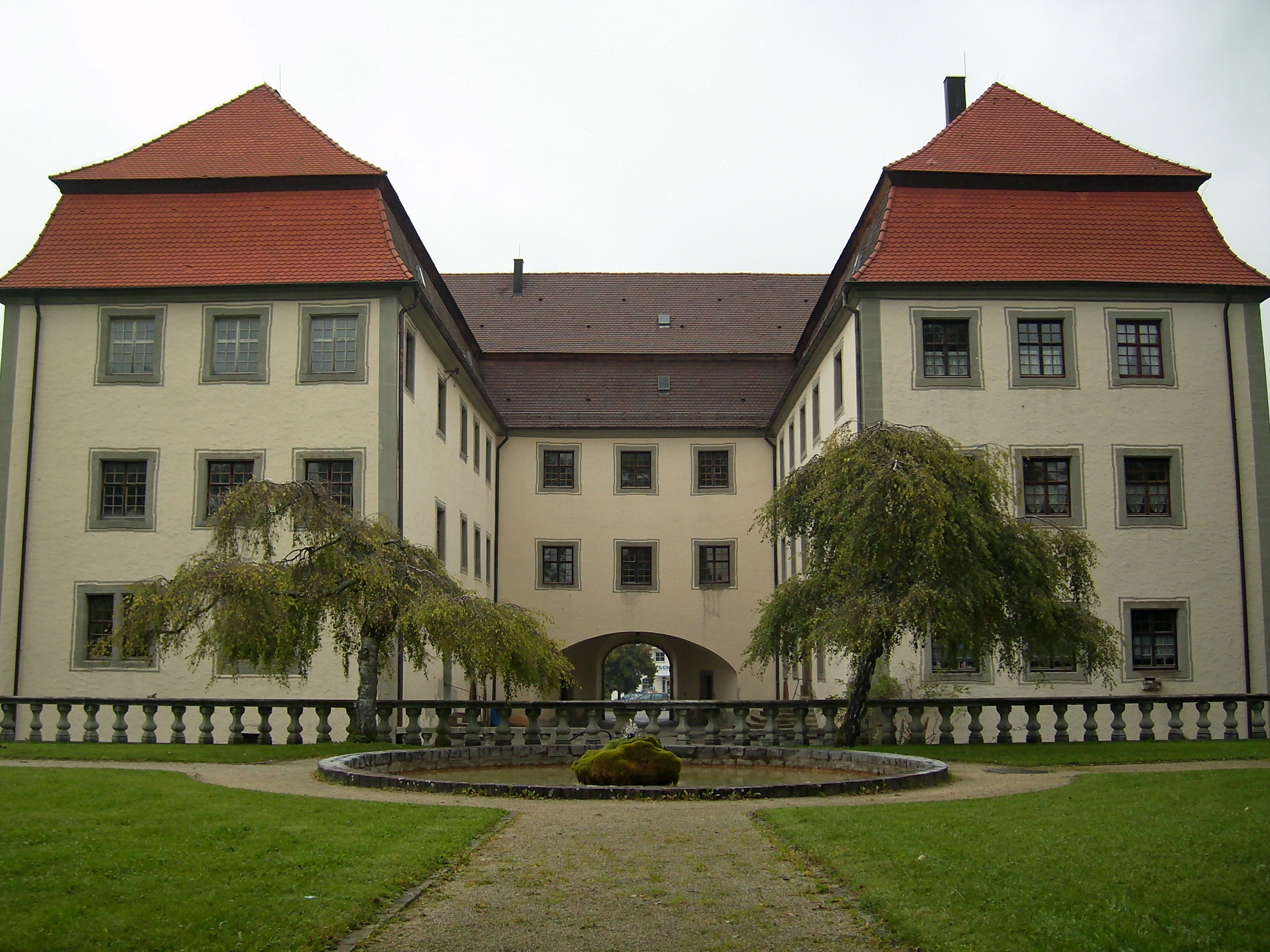 Geislingen (bei Balingen) Stauffenbergschloss Rückansicht